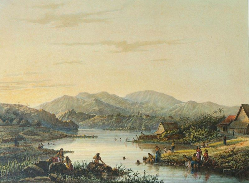 Litho. Litho naar een schilderij van A. Salm.. De badplaats Wenditt